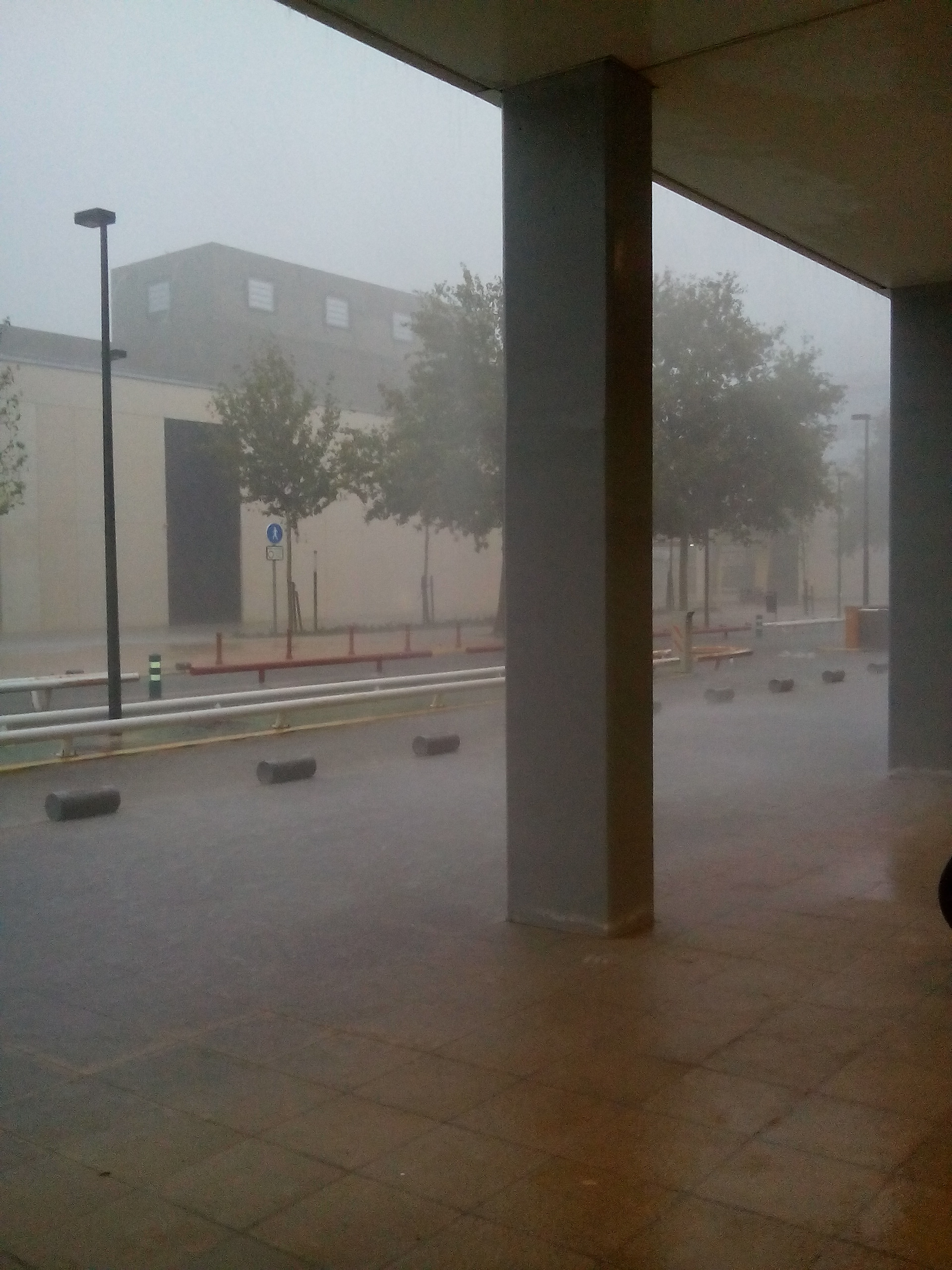 Lluvia torrencial en Valencia, el 13 de septiembre de 2013. Vista desde el edificio 3P de la Universitat Politècnica de València.